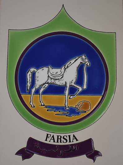 Escudu de Farsia